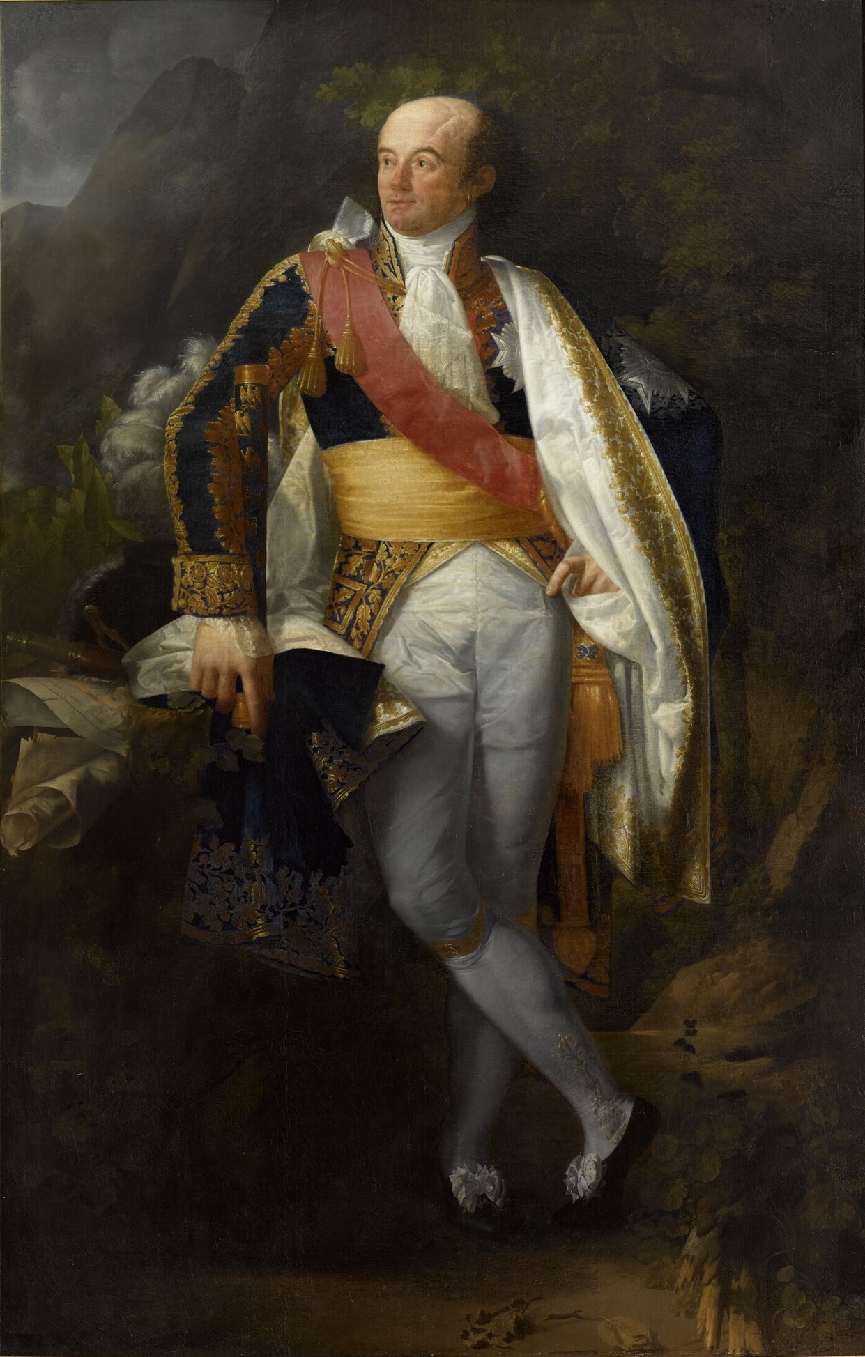 Commandé par Napoléon Ier pour la salle des maréchaux du palais des Tuileries à Paris en 1804